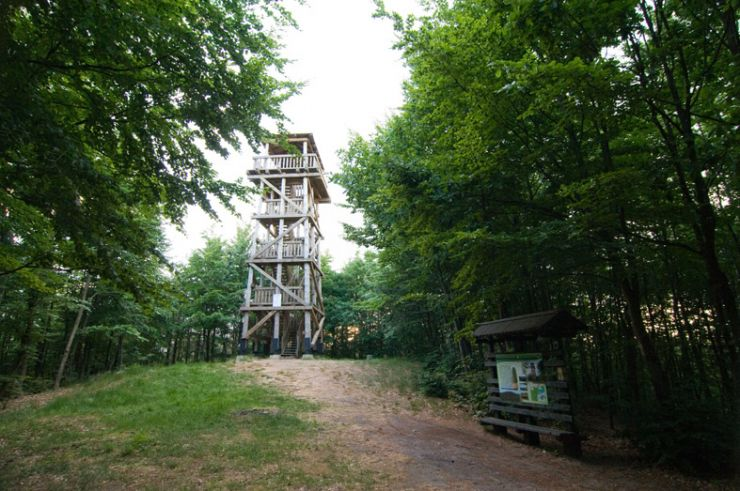 Gora Siemierzycka Kaszëbsczi: Szëmrzëca